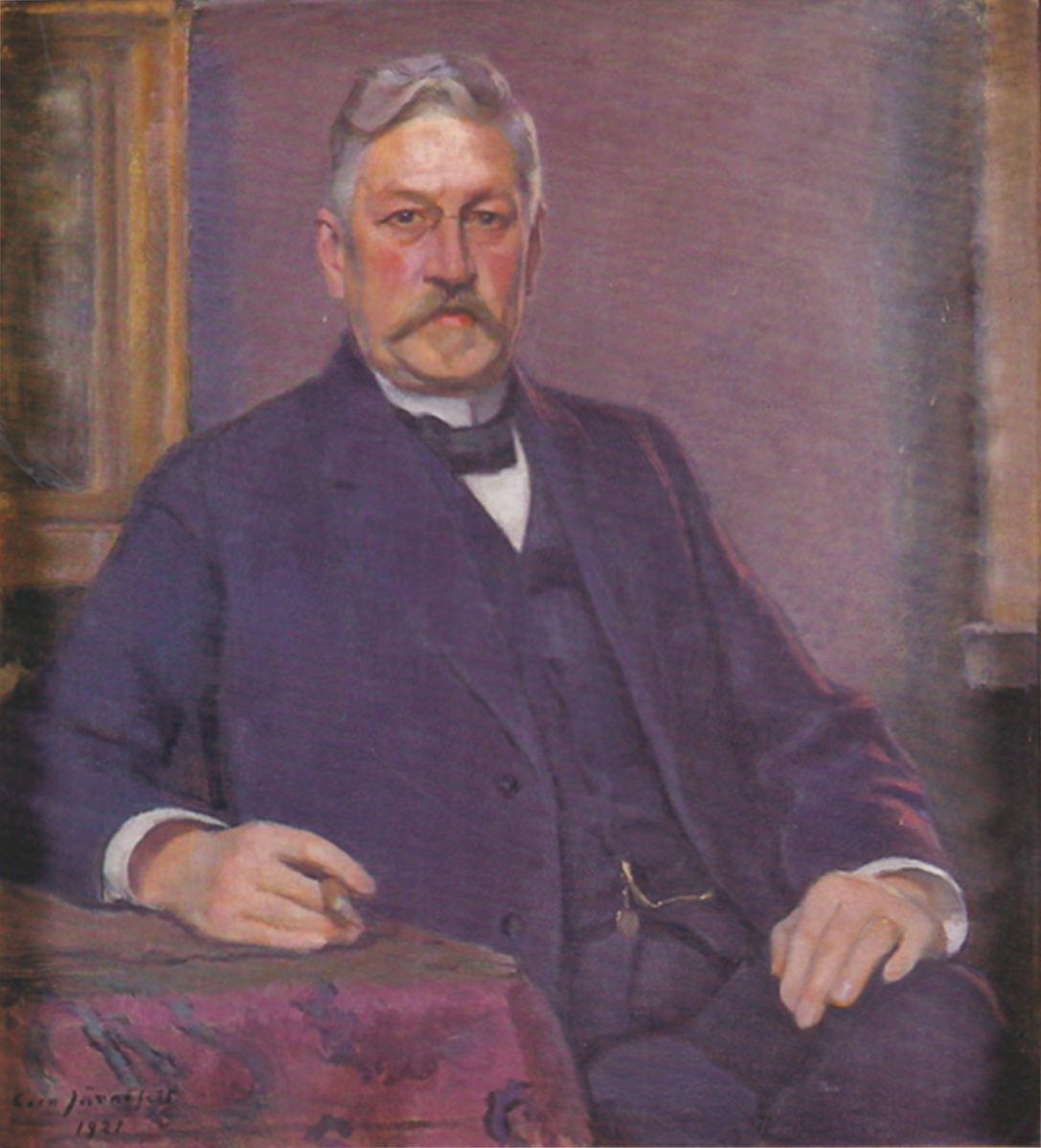 Eduard Polón taiteilija Eero Järnefeltin maalaamana